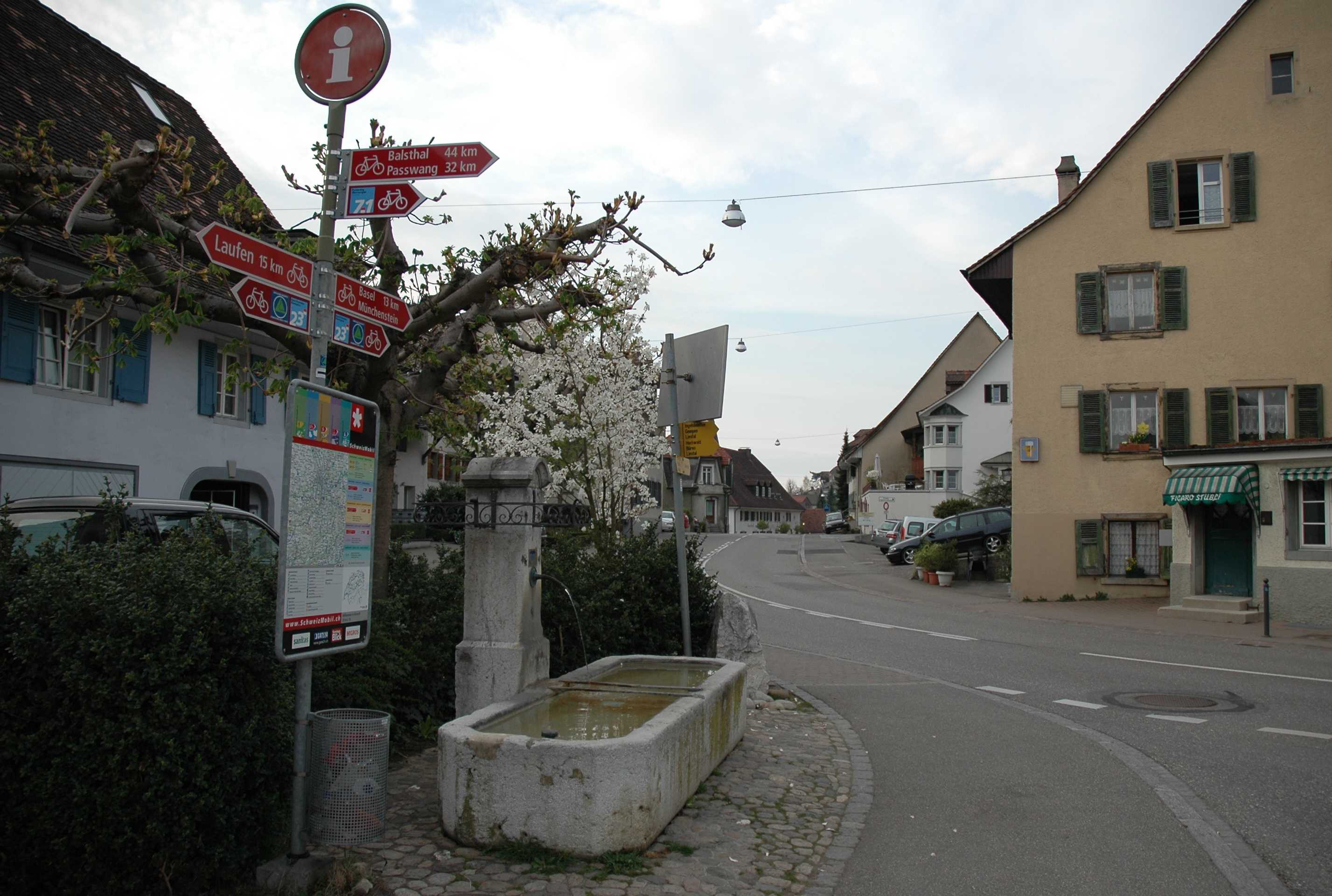 Sykkelruten fra Basel går gjennom Dornach.